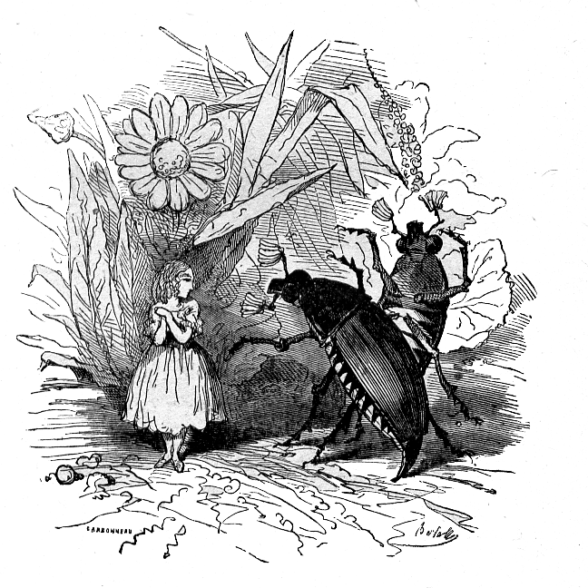 Pour la source voir : Discuter:Contes d'Andersen Vignette de La Petite Poucette par Bertall représentant la petite Poucette et un insecte.